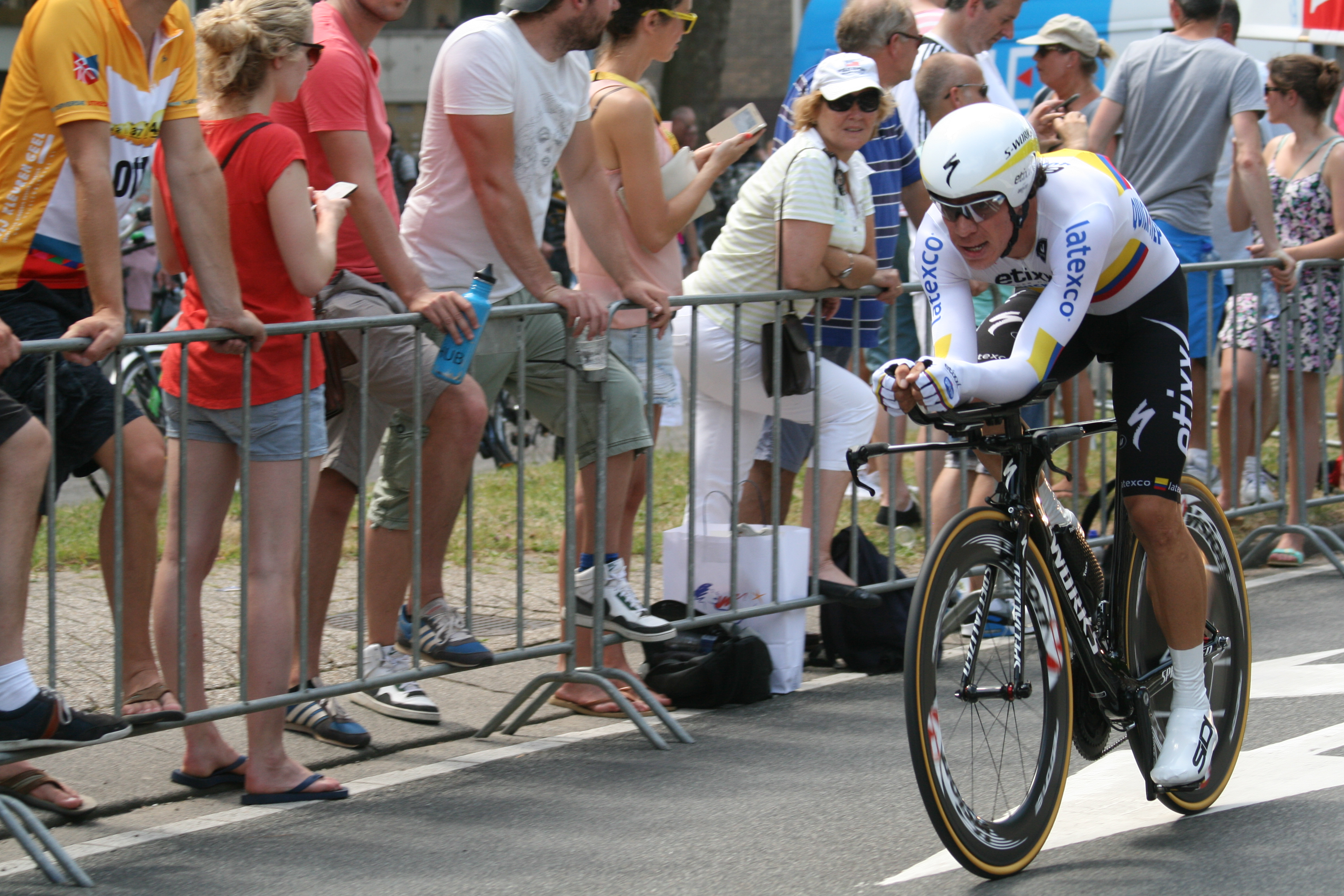 Proloog Tour de France Utrecht